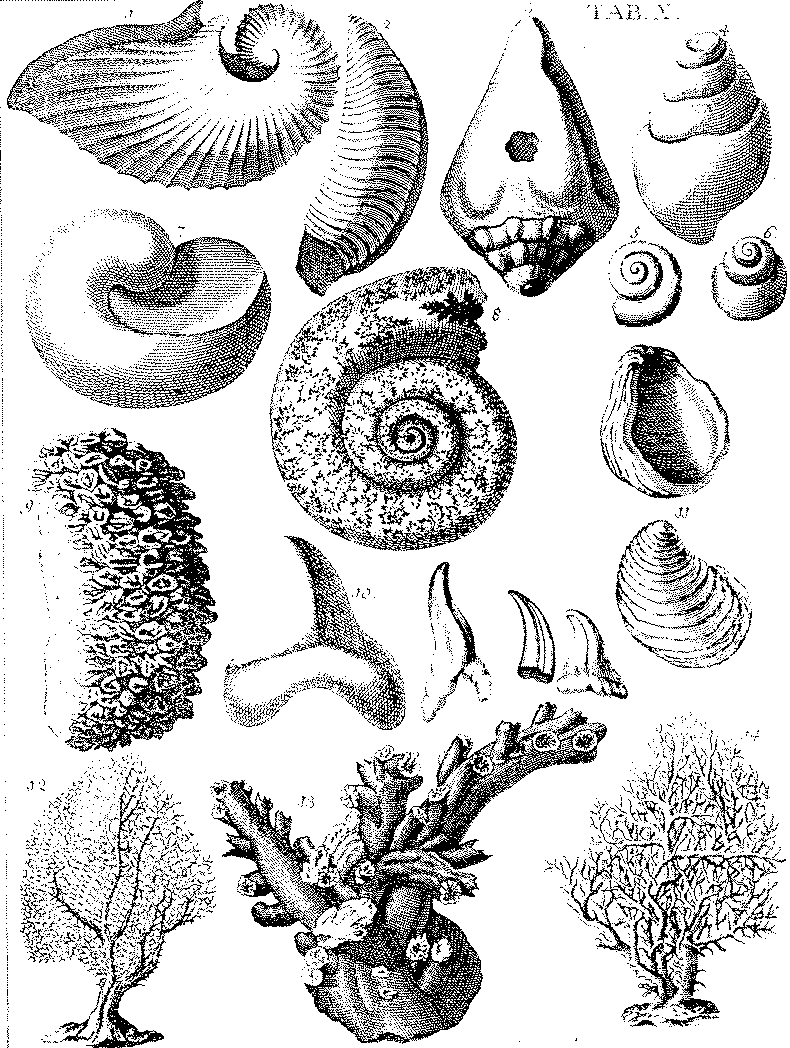 Lamina X del tratado "Aparato para la Historia Natural Española", escrito por José Torrubia en el año 1754